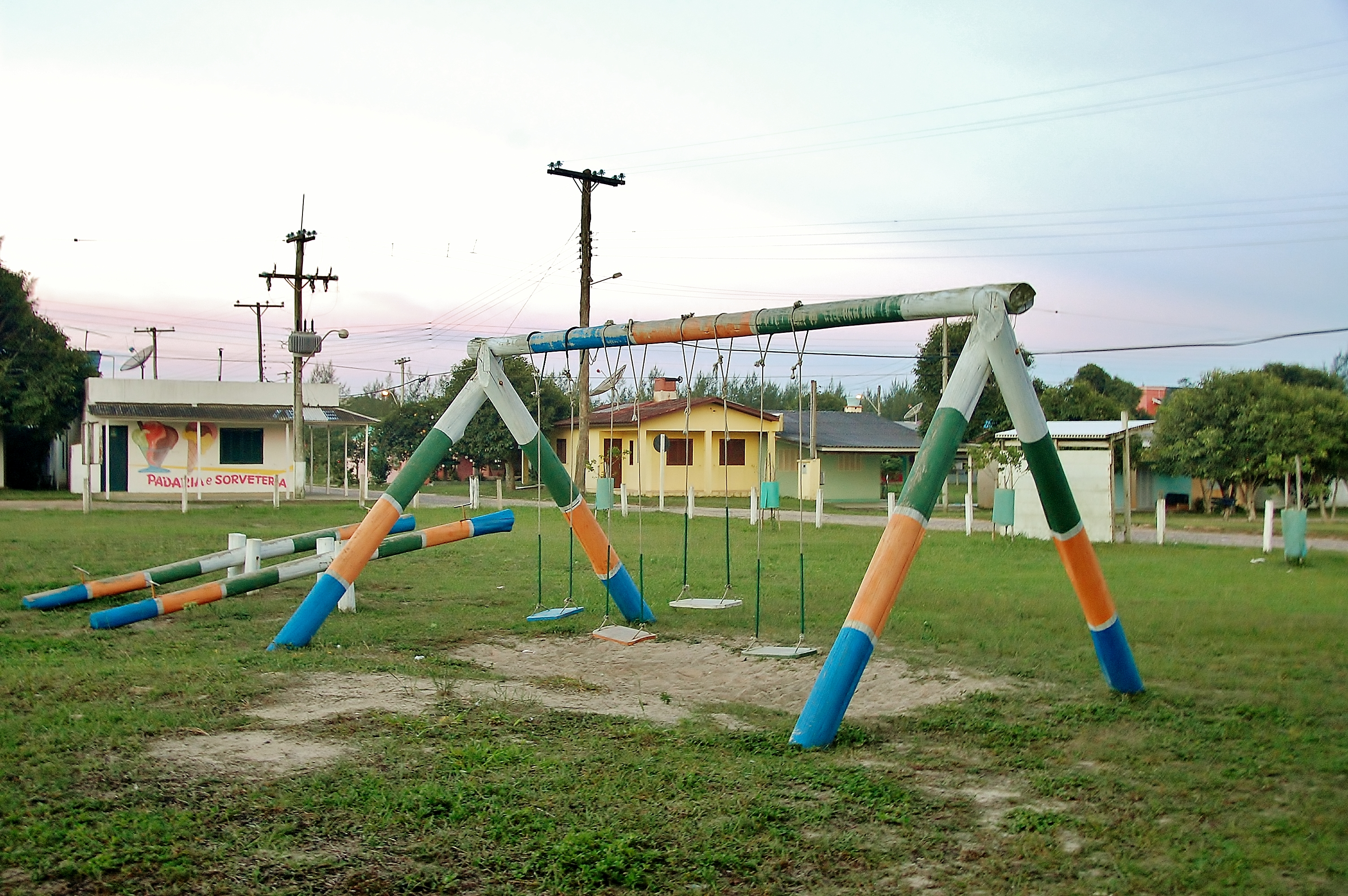 Praça central da Arroio Seco.